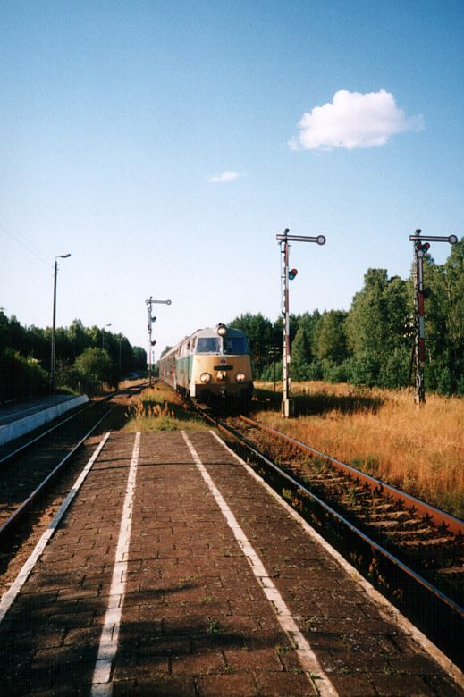 Bładzim - wylot do Wierzchucina i dalej do Gdyni. Wjeżdża pociąg osobowy relacji Wierzchucin - Bydgoszcz Główna.